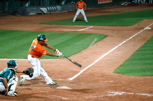 布雷